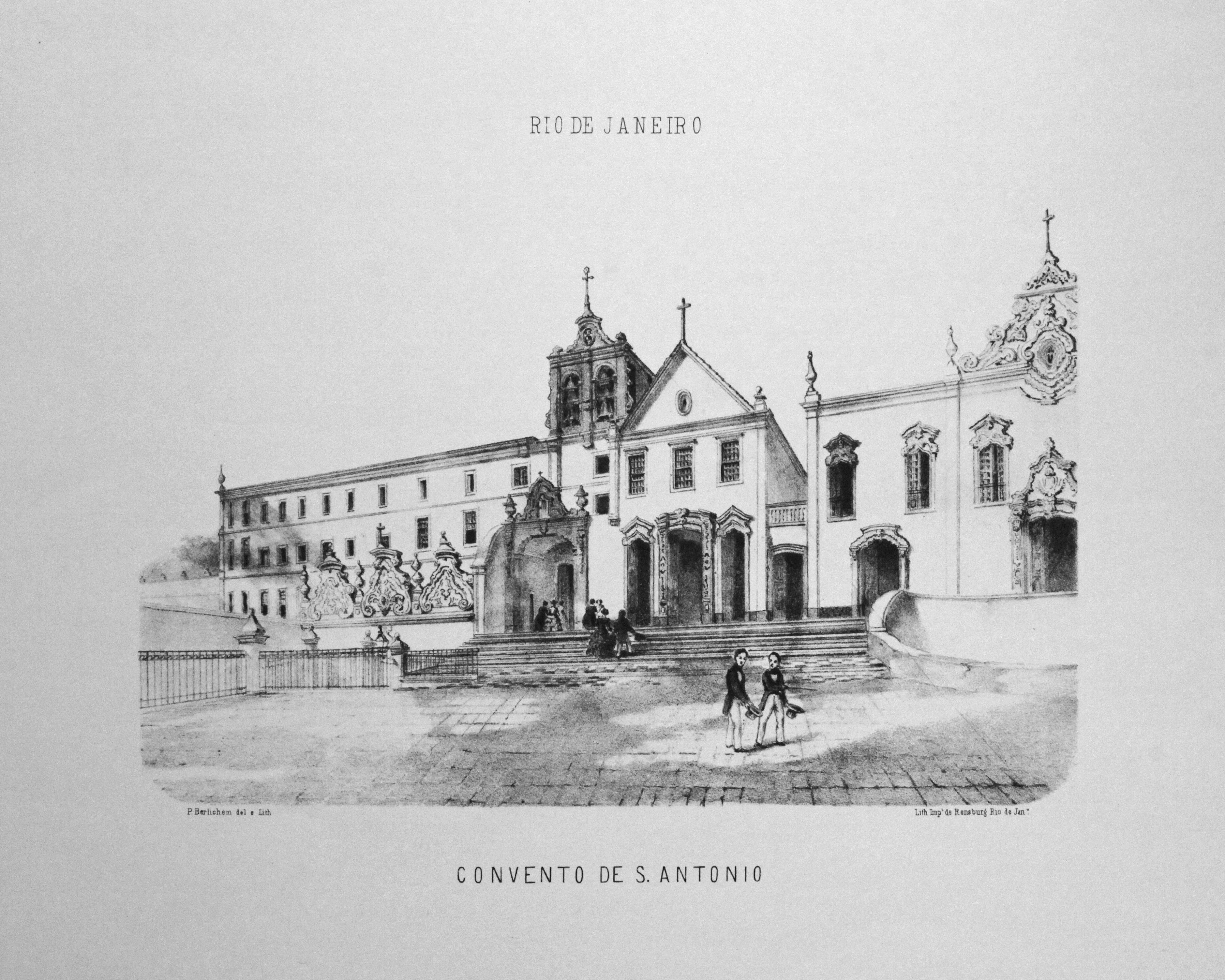 P. G. Bertichem - 1856 - Convento de Santo Antônio do Largo da Carioca no Rio de Janeiro